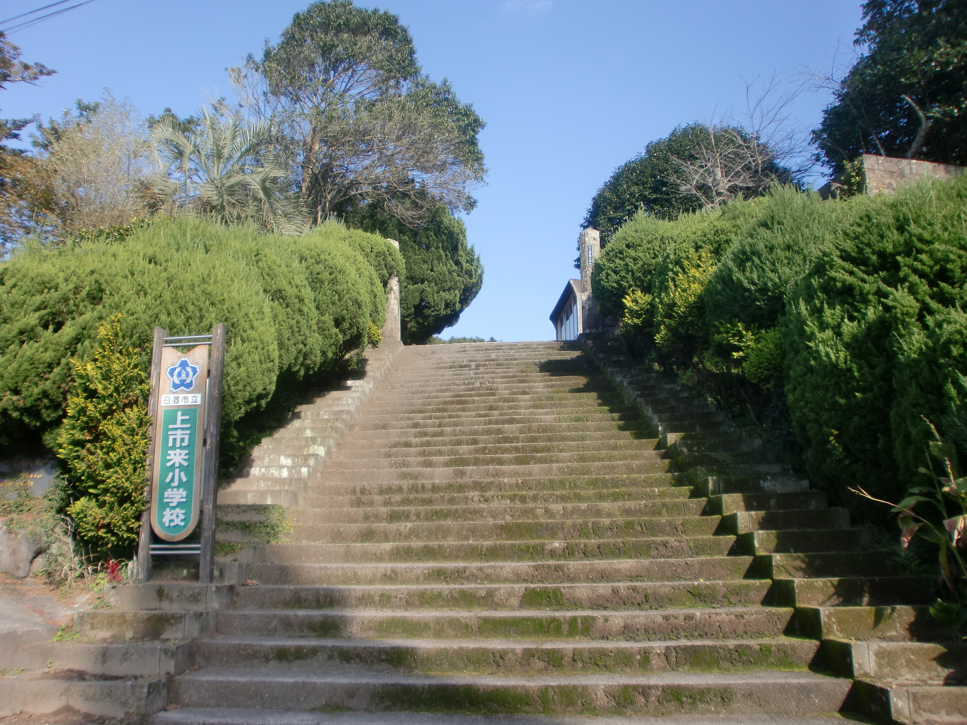 日置市立上市来小学校の外観。